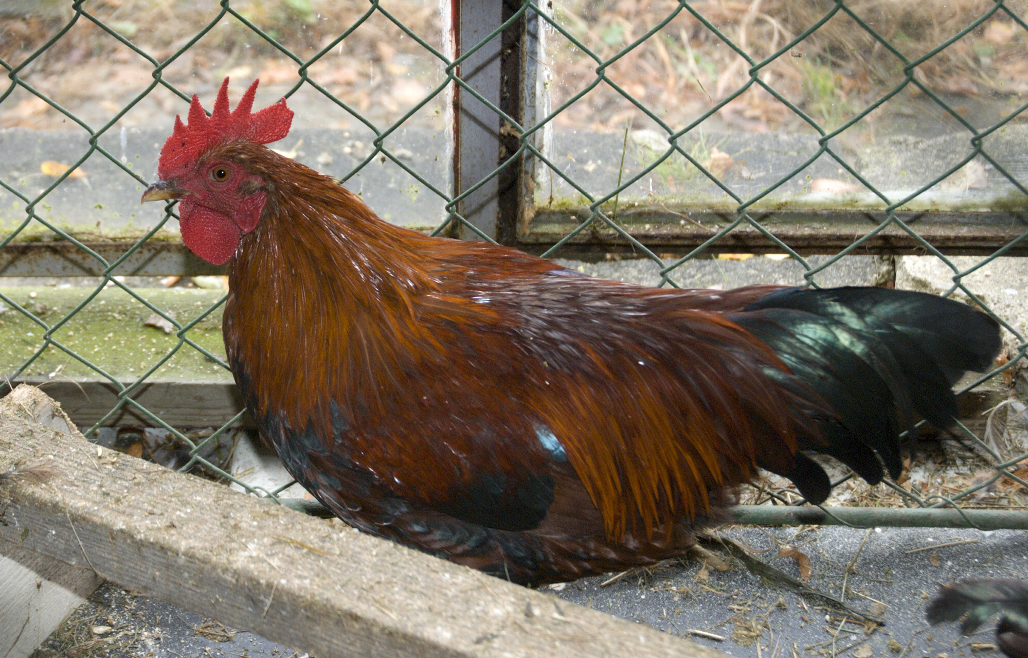 kohout zdrobnělé velsumky